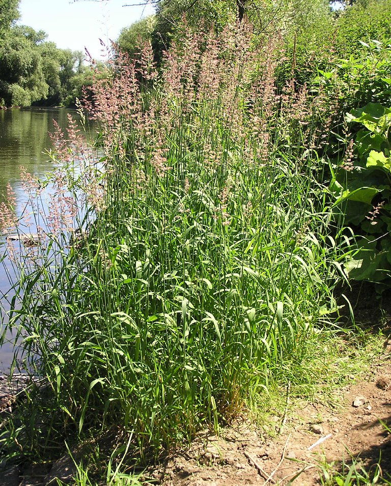 Phalaris arundinacea am Ufer der Sieg bei Bonn.